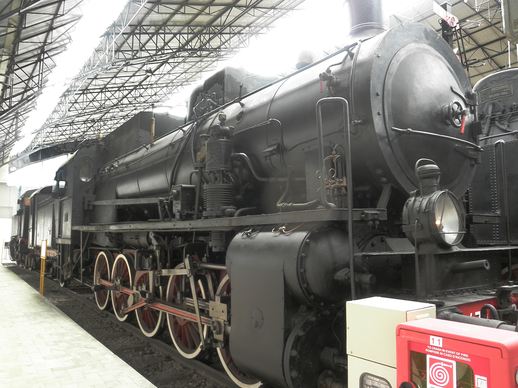 Locomotiva a vapore gruppo 470 delle Ferrovie dello Stato conservata al Museo della Scienza e della Tecnologia di Milano.